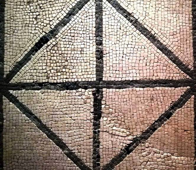 Mosaico con disegno di figure geometriche dal Museo Nazionale Archeologico di Taranto (Marta)